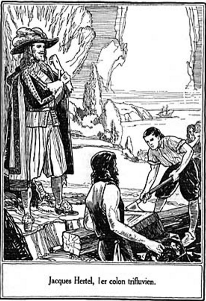 Jacques Hertel, 1er colon trifluvien